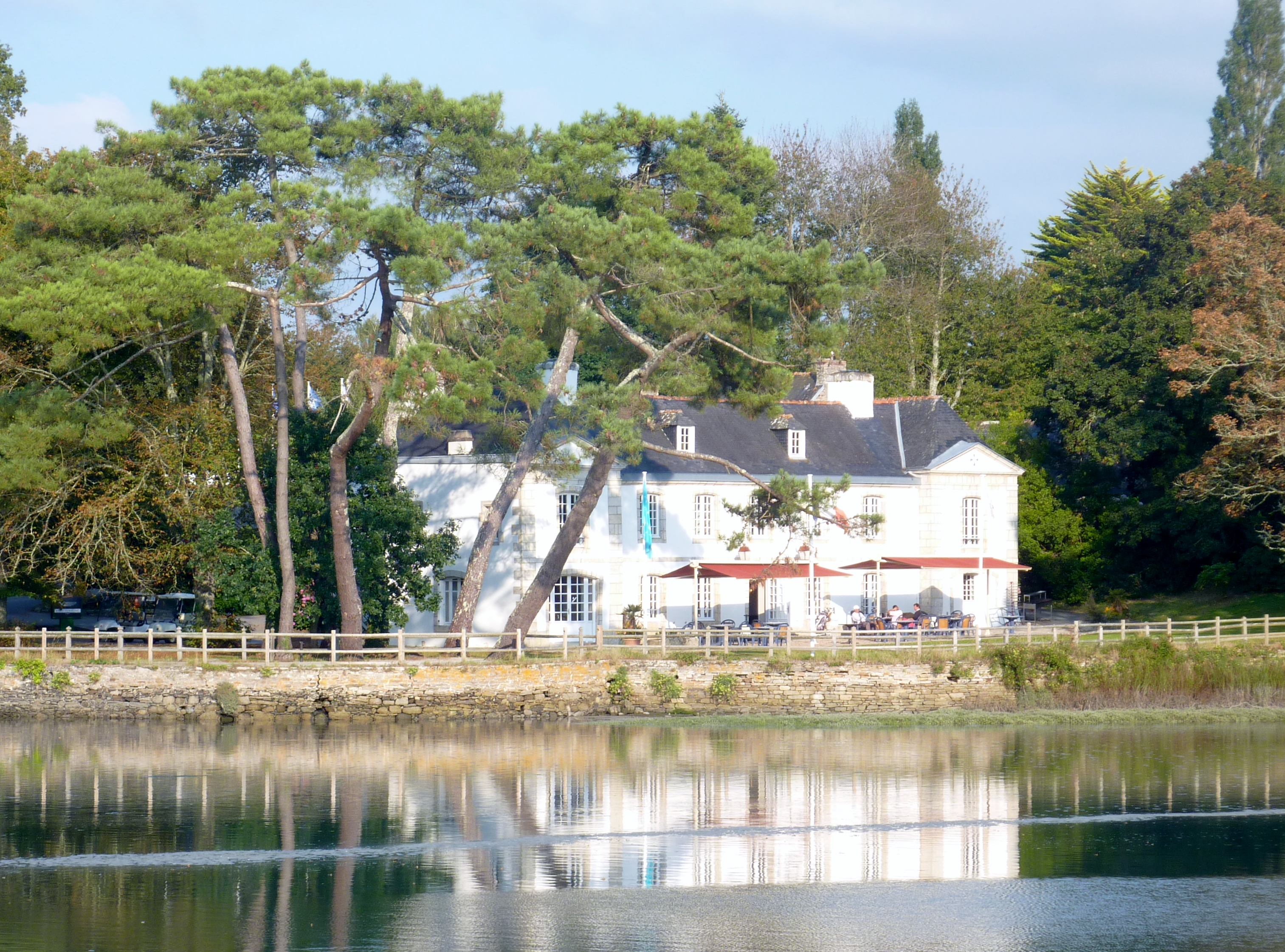 La Forêt-Fouesnant : le manoir de Mesmeur (XVIIIème siècle) en bordure de la ria. Il appartint à la famille de Sylguy (noblesse quimpéroise). Désormais siège du club-house du "Golf de Cornouaille" (18 trous)